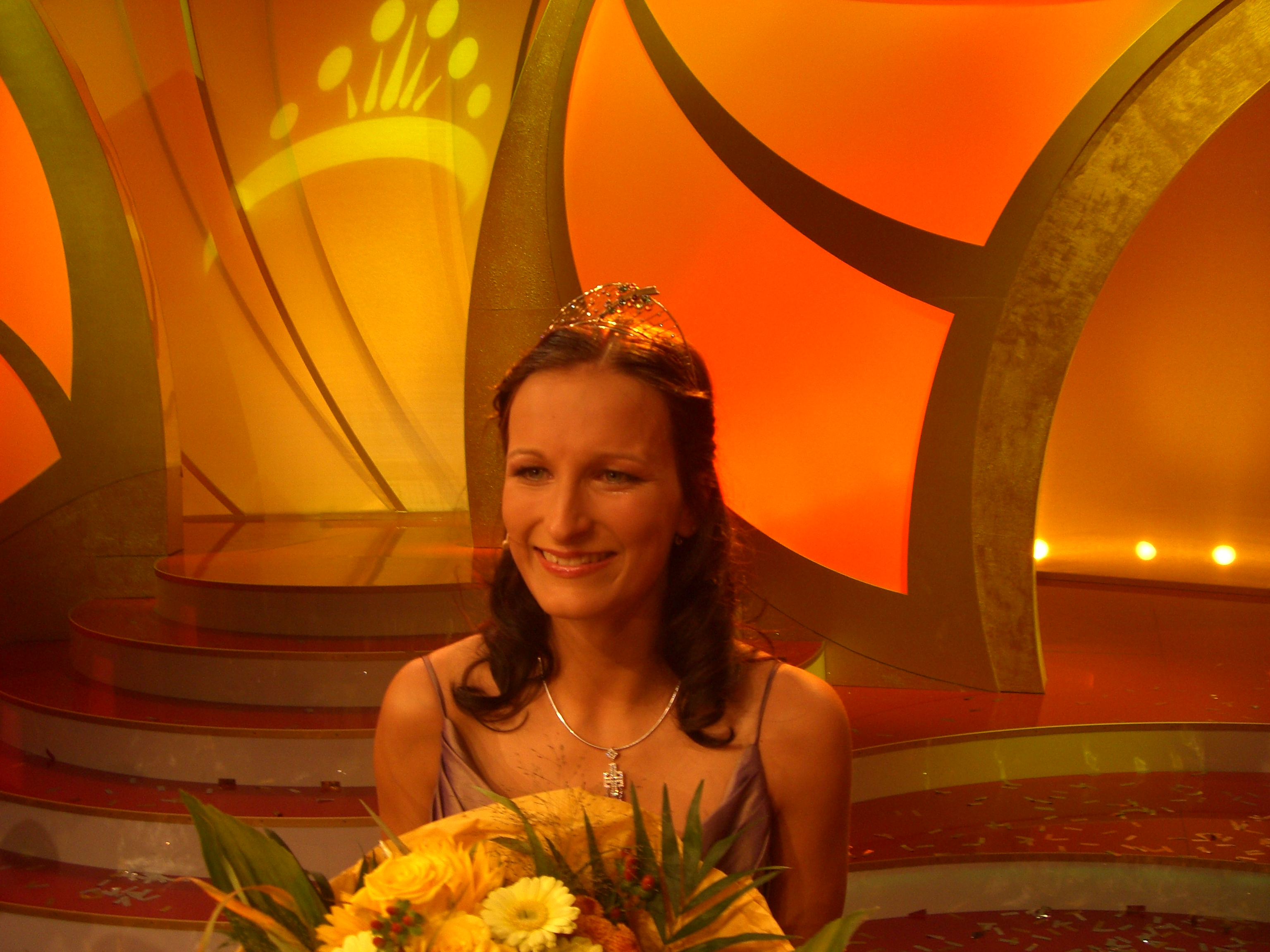 Die Deutsche Weinkönigin Evelyn Schmidt, einige Momente nach ihrer Krönung, am 12. Oktober 2007 im Saalbau zu Neustadt an der Weinstraße